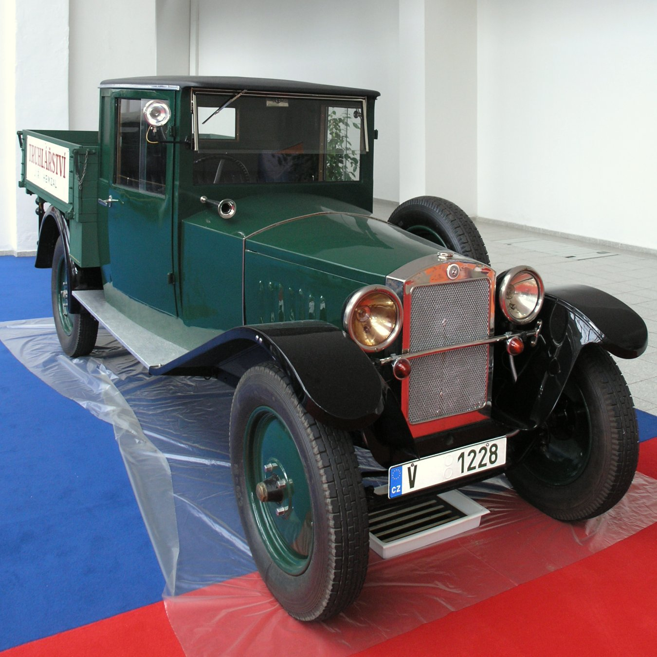 Z18 (1930).